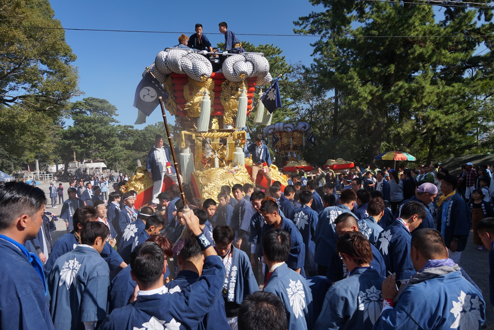 琴弾八幡宮へ貮號本若太鼓が宮入りしたところ